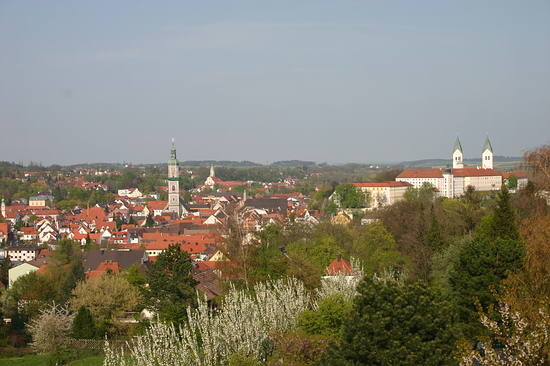 Sicht auf Freising vom Weihenstephaner Berg aus